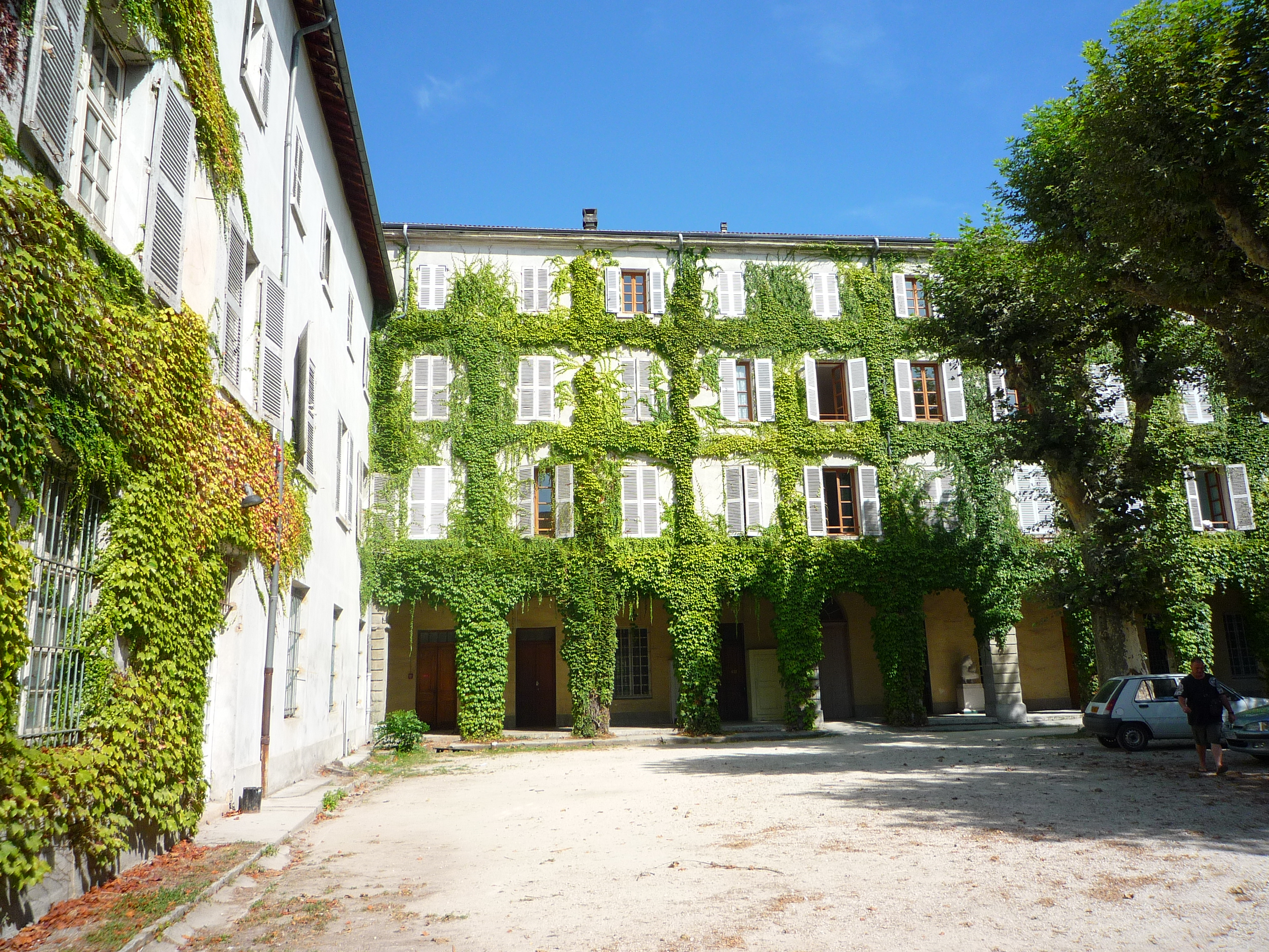 Vue de l'aile Sainte-Ursule dans la cour du Couvent des Minimes de Grenoble.